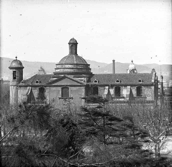 Iglseia de la Ciudadela, 1921, foto de Josep Salvany i Blanch.